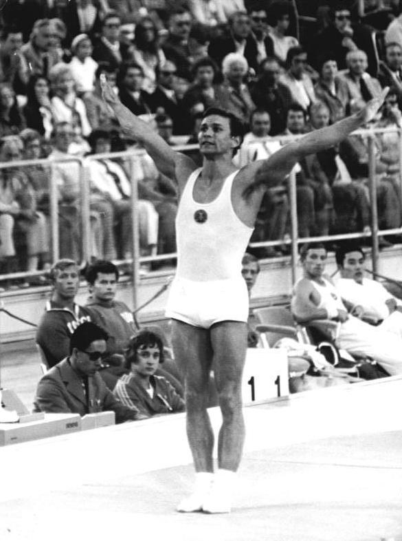 ADN-ZB-Olympiadienst-Link-2.9.72-ma-München: XX. Olympische Sommerspiele-Turnen: Was kaum jemand für möglich gehalten hatte, wurde beim Gerätefinale der Turner am Abend des 1.9.1972 Wirklichkeit: Klaus Köste (DDR), der an insgesamt drei Geräten in den Finalwettbewerben vertreten war, erkämpfte sich im Pferdsprung die olympische Goldmedaille. Der 29jährige Leipziger errang damit den größten Erfolg seiner 18jährigen sportlichen Laufbahn. Hier hat er seinen zweiten Sprung, ein Handstandüberschlag mit ganzer Drehung beendet und damit den Sieg erkämpft.